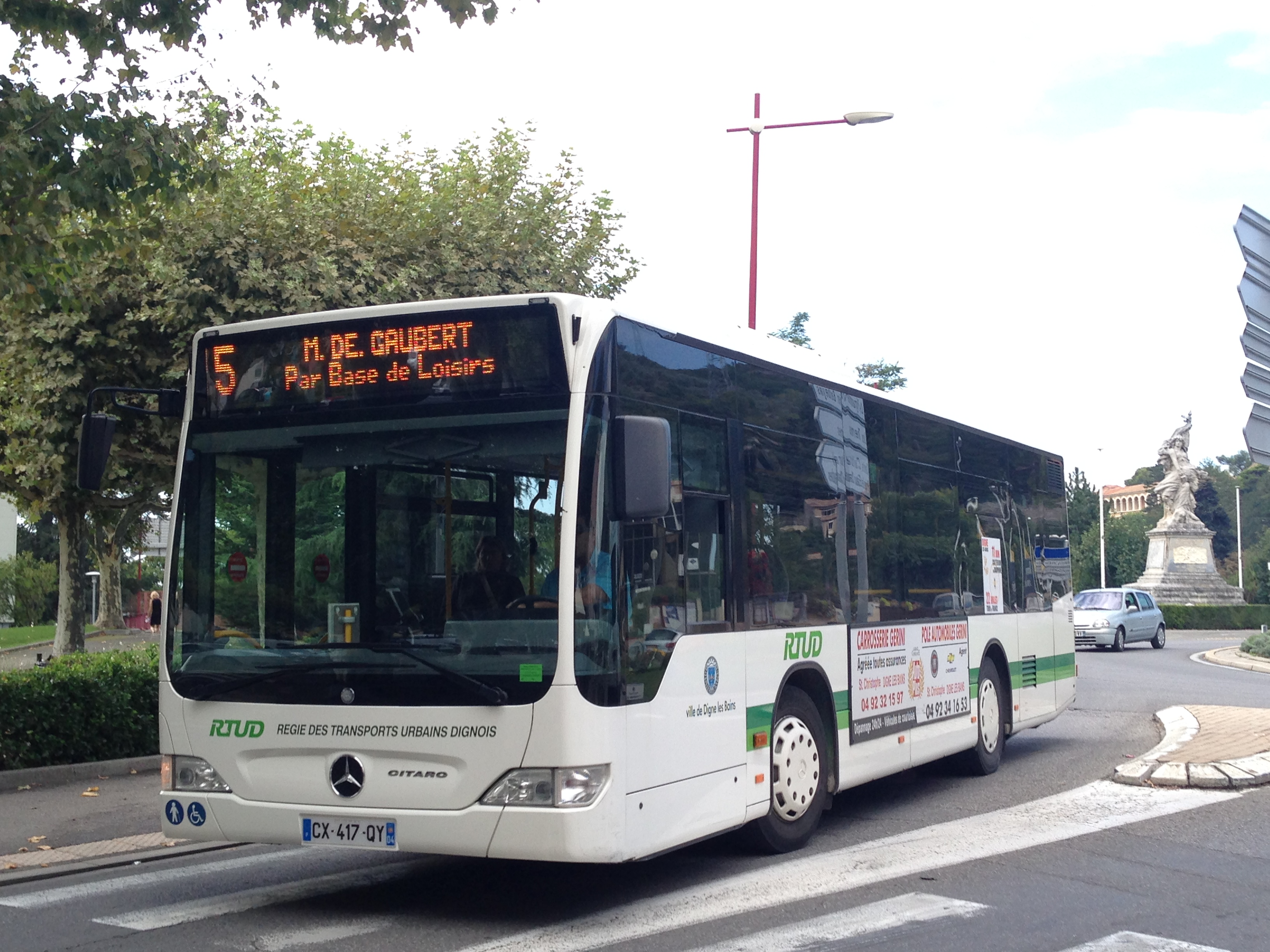 un bus de ligne 5 à Digne-les-Bains